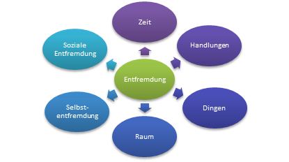 Entfredmungsmöglichkeiten in Anlehnung an Hartmut Rosa